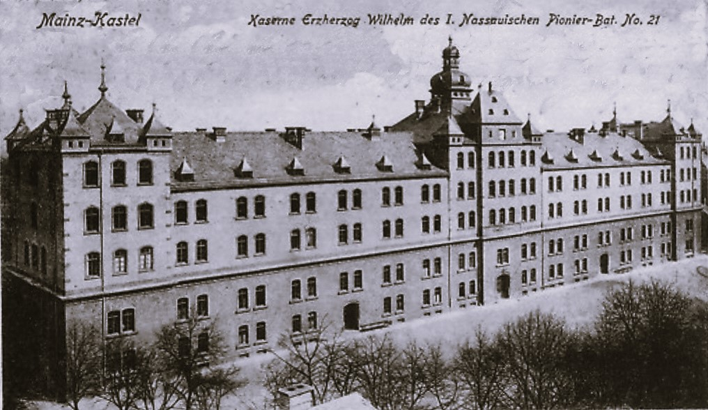 Erzherzog-Wilhelm-Kaserne in Mainz-Kastel. Vor der Eingemeindung hieß es "Kastel (Rhein)", nach der Eingemeindung 1. April 1908 "Mainz-Kastel".